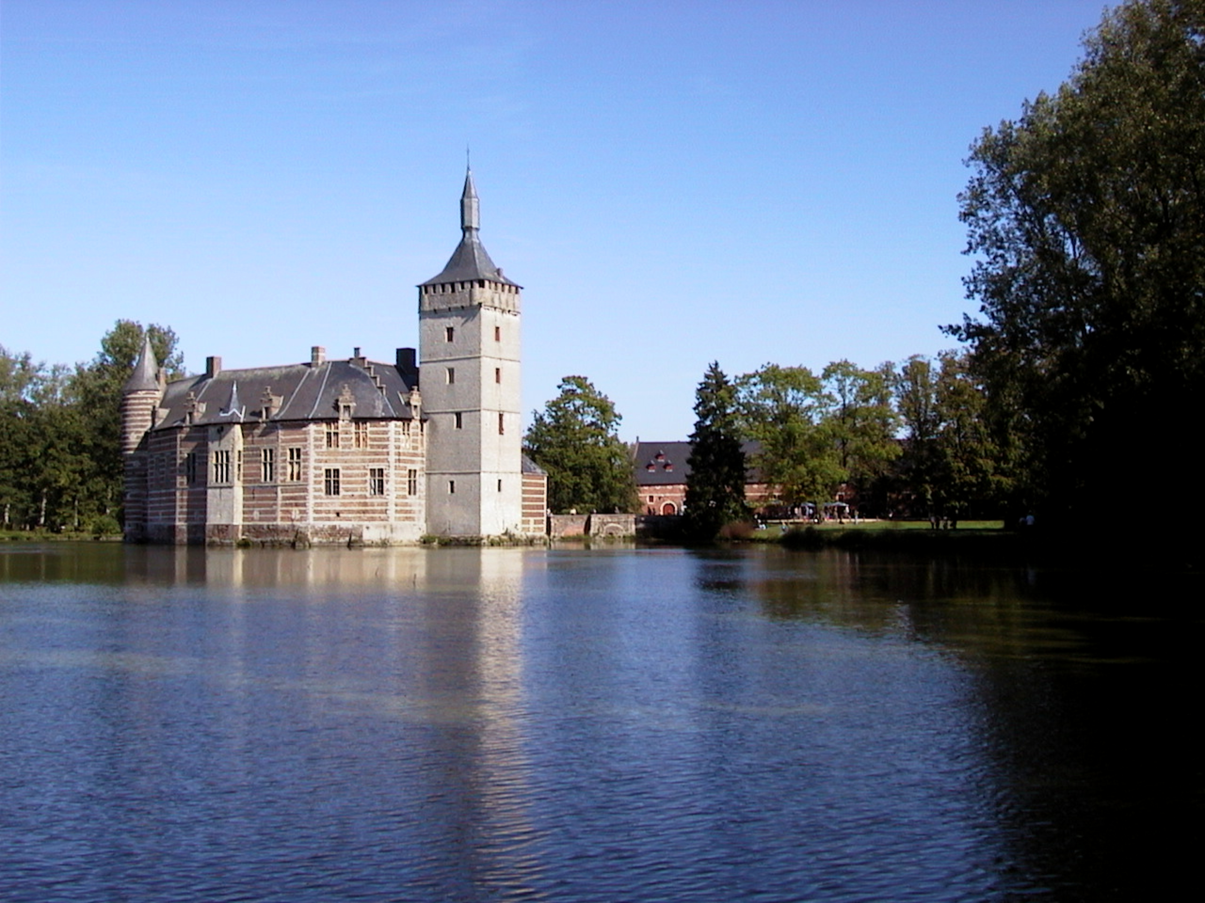 Kasteel van Horst - van oorsprong middeleeuwse waterburcht. België Vlaams-Brabant Sint-Pieters-Rode / Holsbeek. De vermelding van 'Castellum Rode' gaat terug tot rond 1100. In de 13e eeuw (1268) werd de familie Van Thunen eigenaar van het kasteel. Later ging de familie zich 'van Horst' noemen.